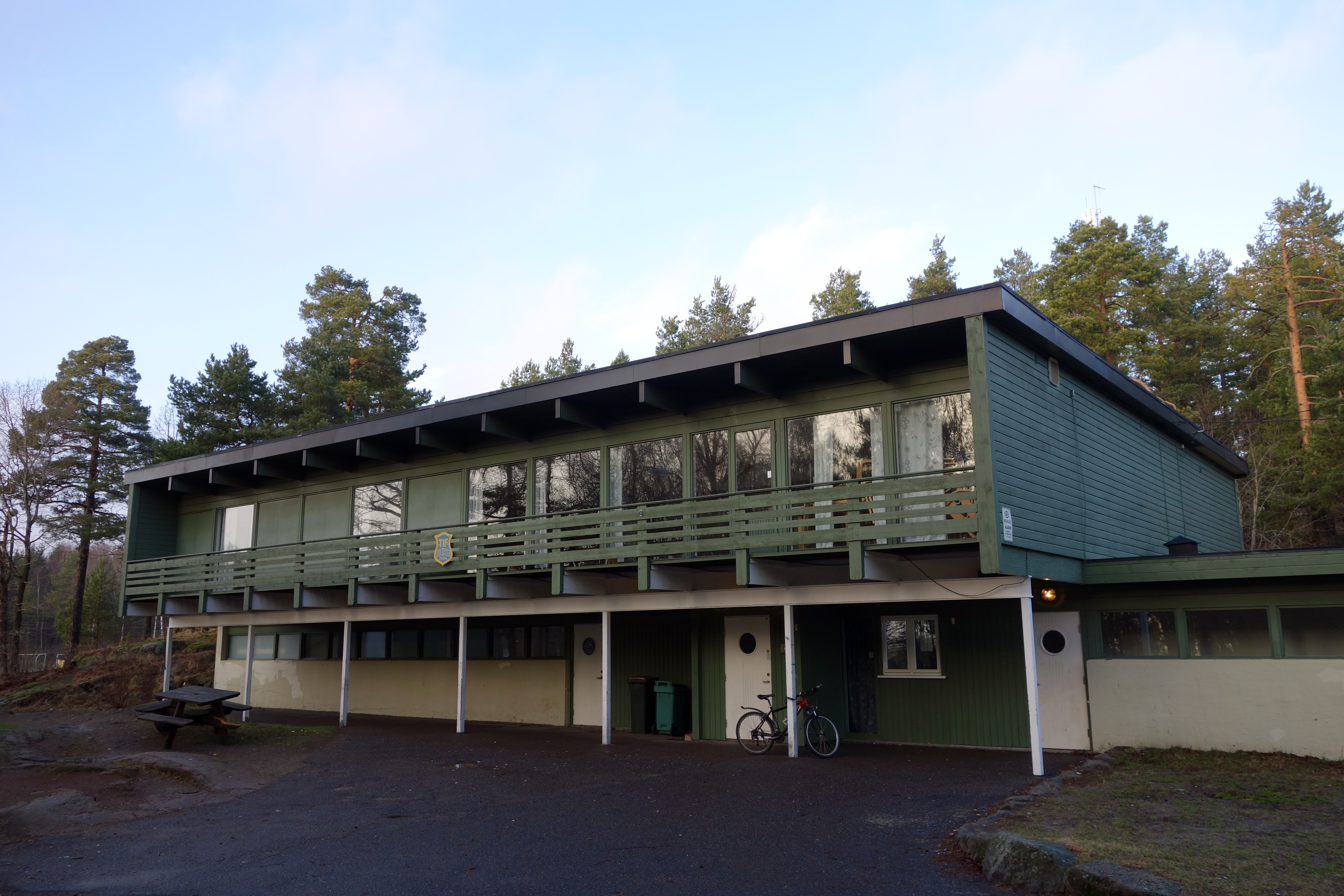 Klubbhuset til Teie IF på Nøtterøy i Vestfold